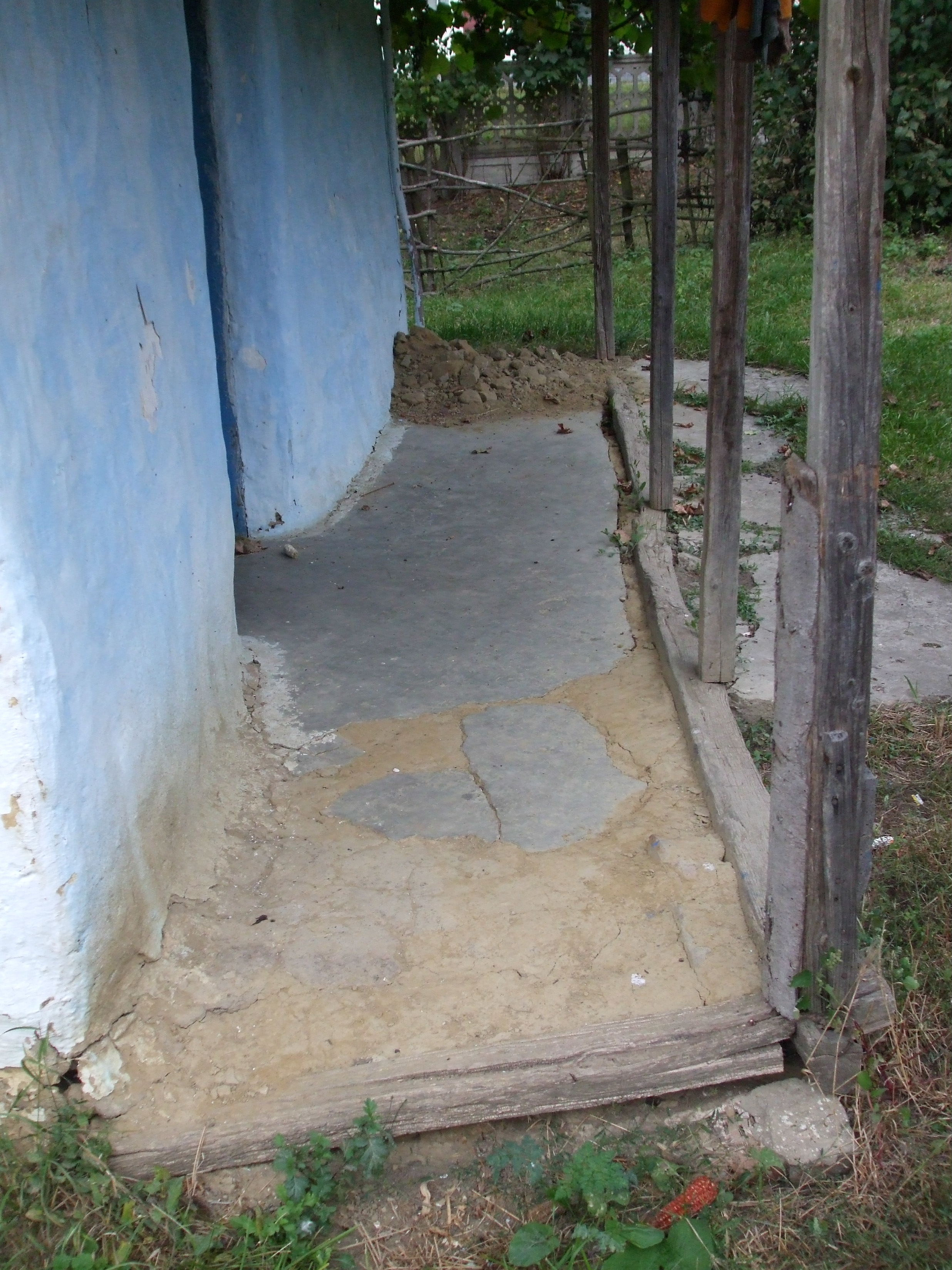 Tirnațul {tinda } unei case din Aruncuta , specifică perioadei 1900 - 1940 . Casa era formată dintr-o singură incăpere si acest tirnaț in față .